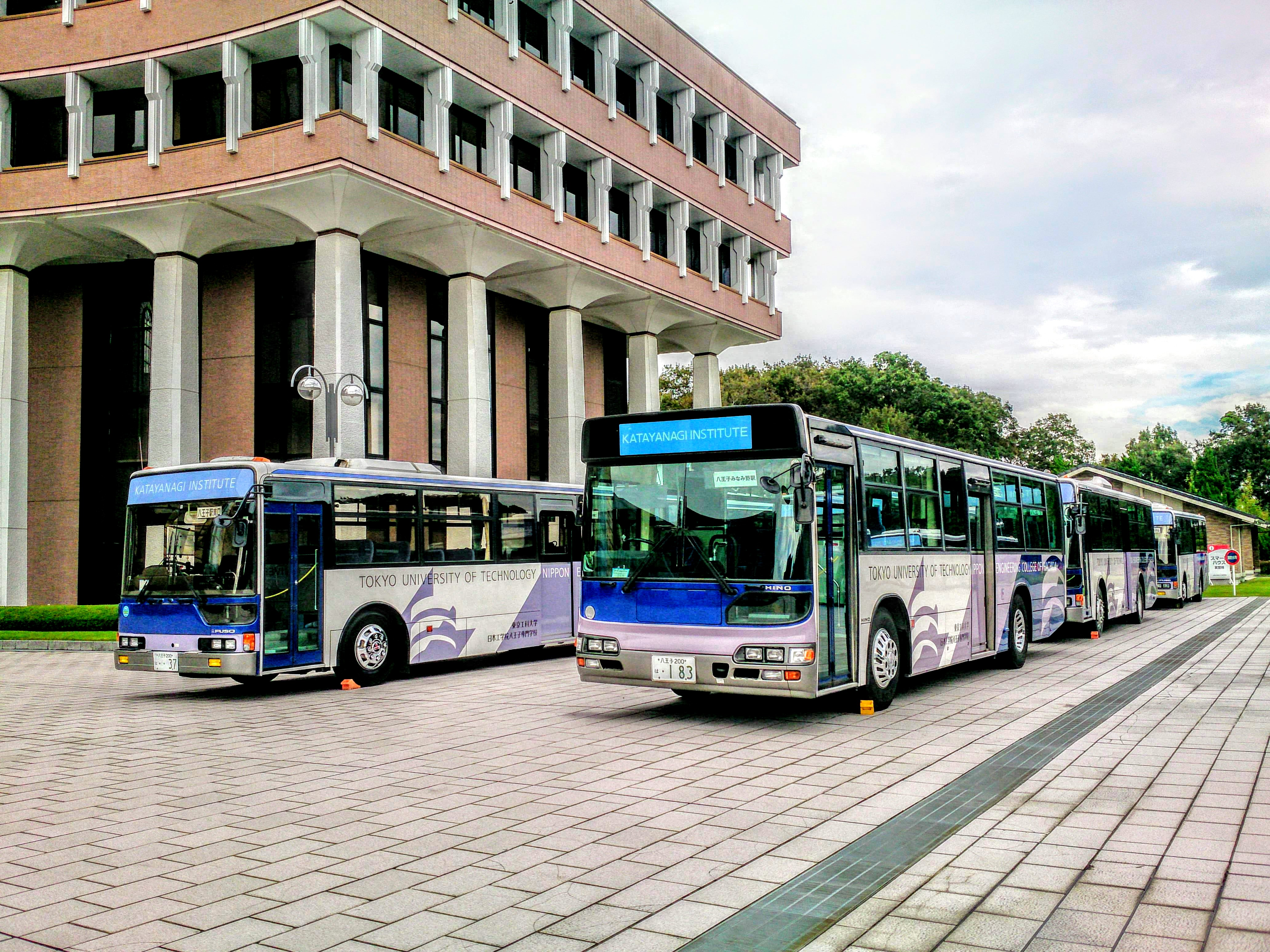 日本工学院八王子 スクールバス車庫